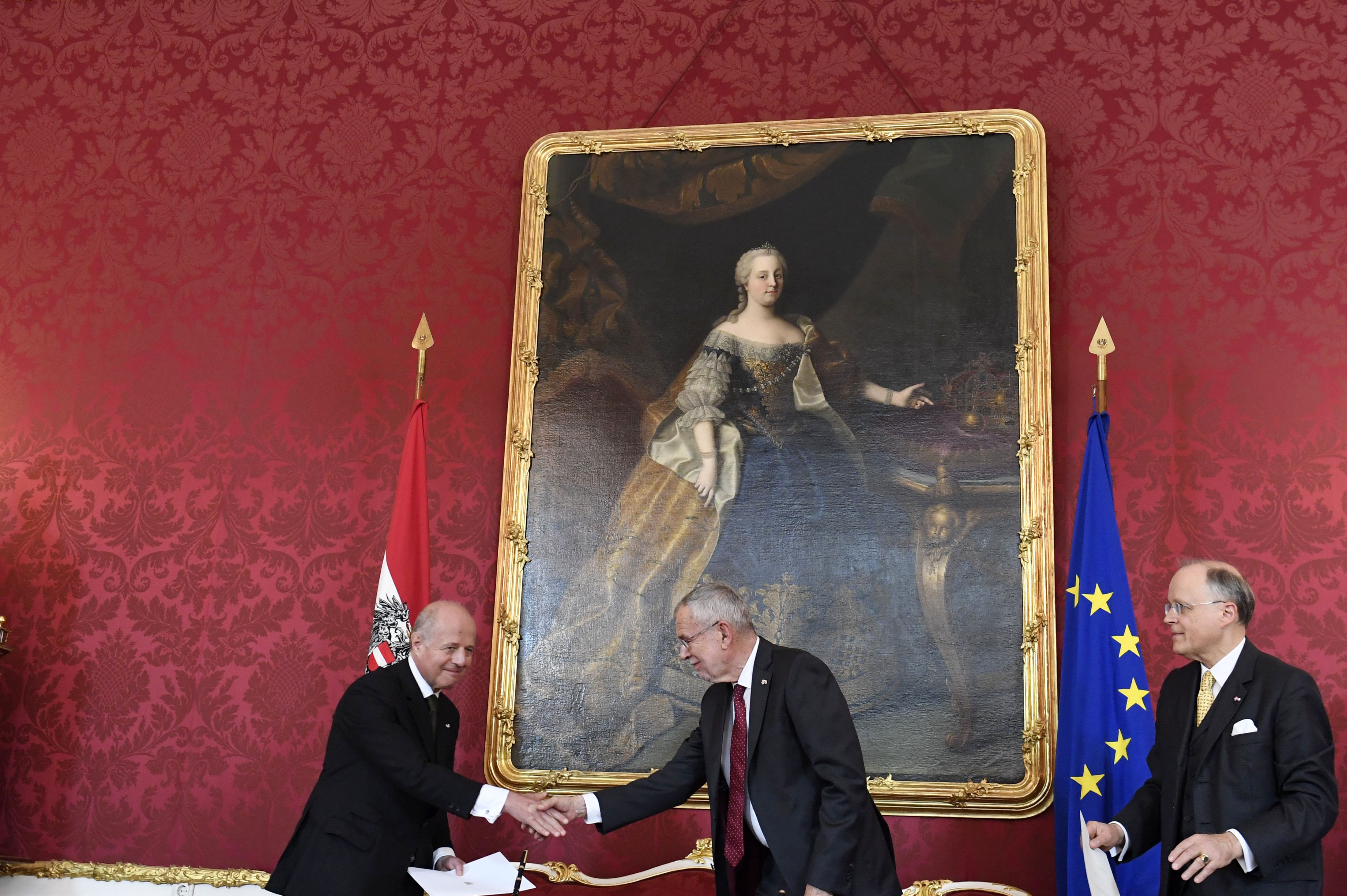 Am 3. Juni 2019 wurde Mag. Alexander Schallenberg als Bundesminister für Europa, Integration und Äußeres angelobt. Foto: Mahmoud